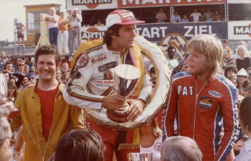 Norisring Cup - Nürnburg, Germany 1976